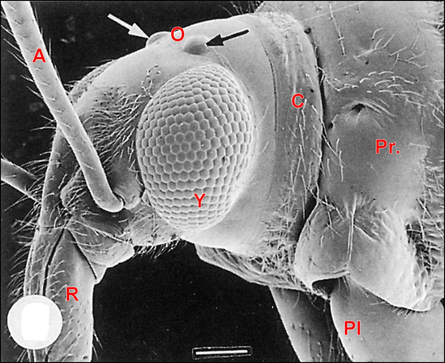 Vue latérale de la partie antérieure du corps d' Arachnocoris varius. Microscopie électronique à balayage.